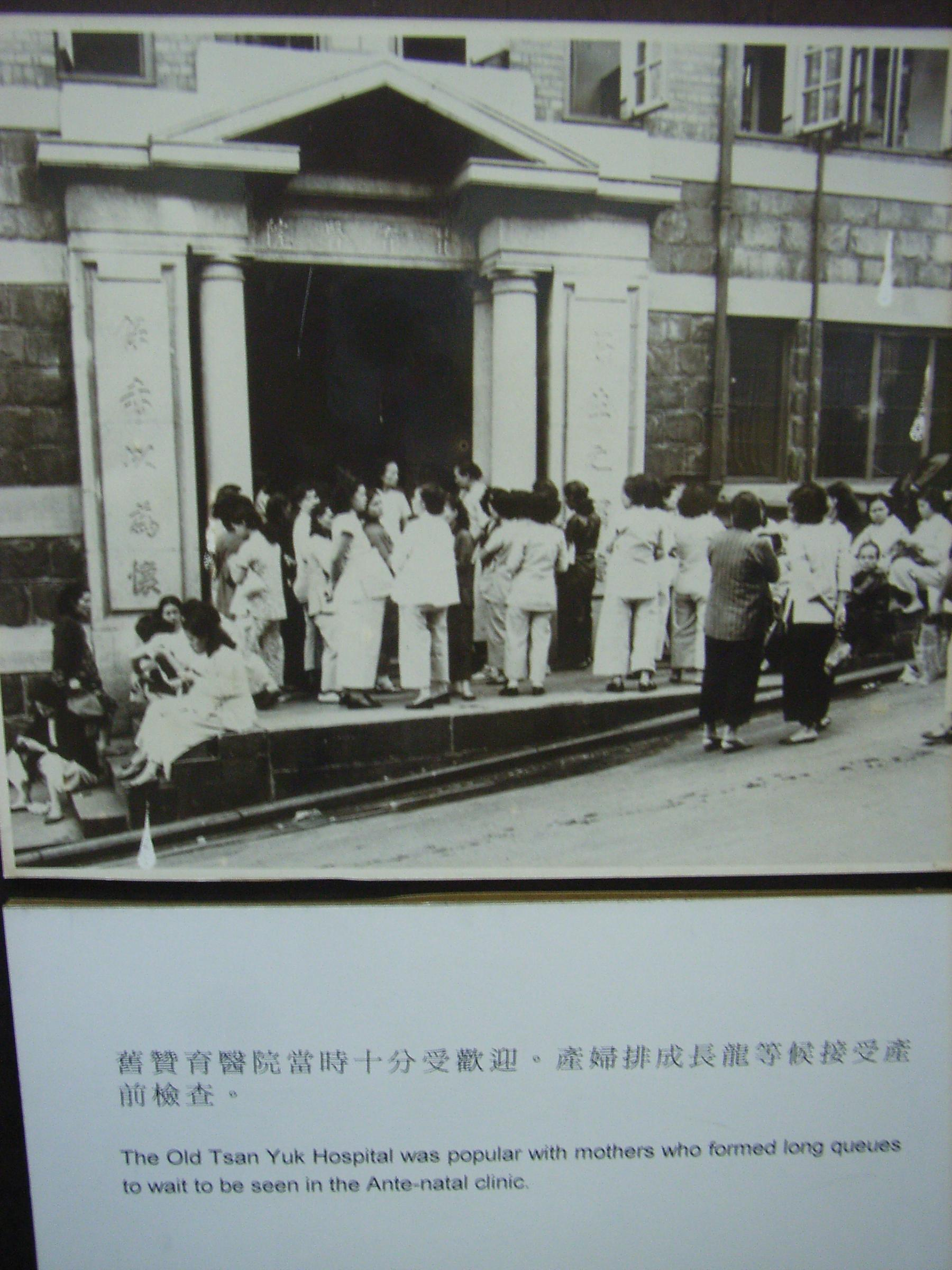 香港zh:公共醫療zh:歷史之zh:贊育醫院